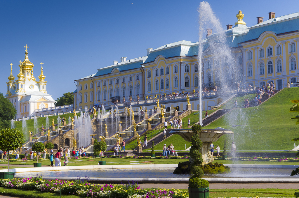 Петергоф